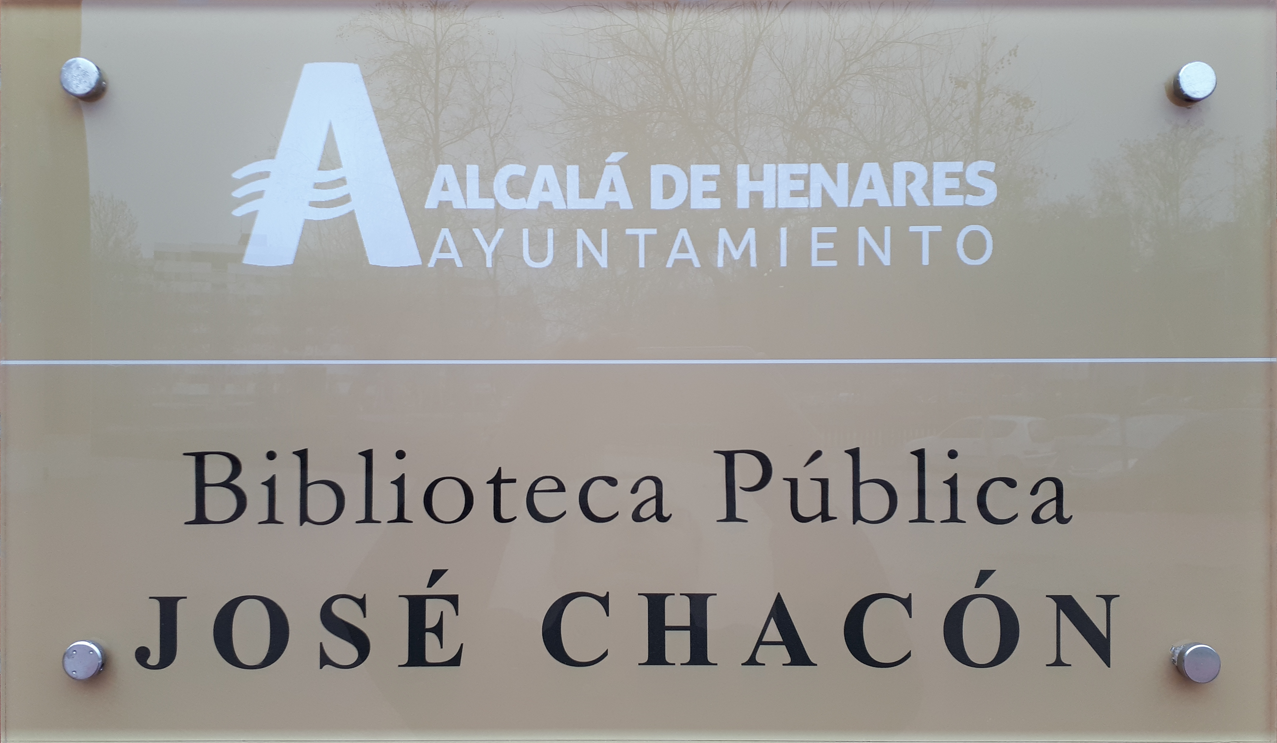 Cartel de la Biblioteca pública municipal "José Chacón" del Distrito V (El Val) situada en la plaza de Sepúlveda, nº 12, de Alcalá de Henares (Comunidad de Madrid - España). Dedicada al poeta José Chacón desde el 15 de septiembre de 2017.